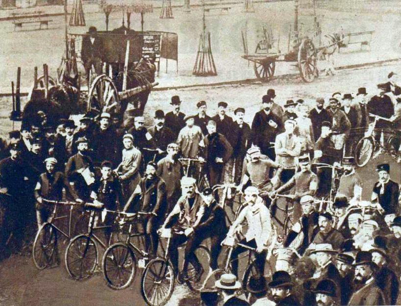 Départ de Bordeaux-Paris 1891, devant une foule clairsemée à Bordeaux. 23 mai 1891, 5 heures du matin, Place du Pont (actuelle place Stalingrad), Bordeaux, Gironde, France.